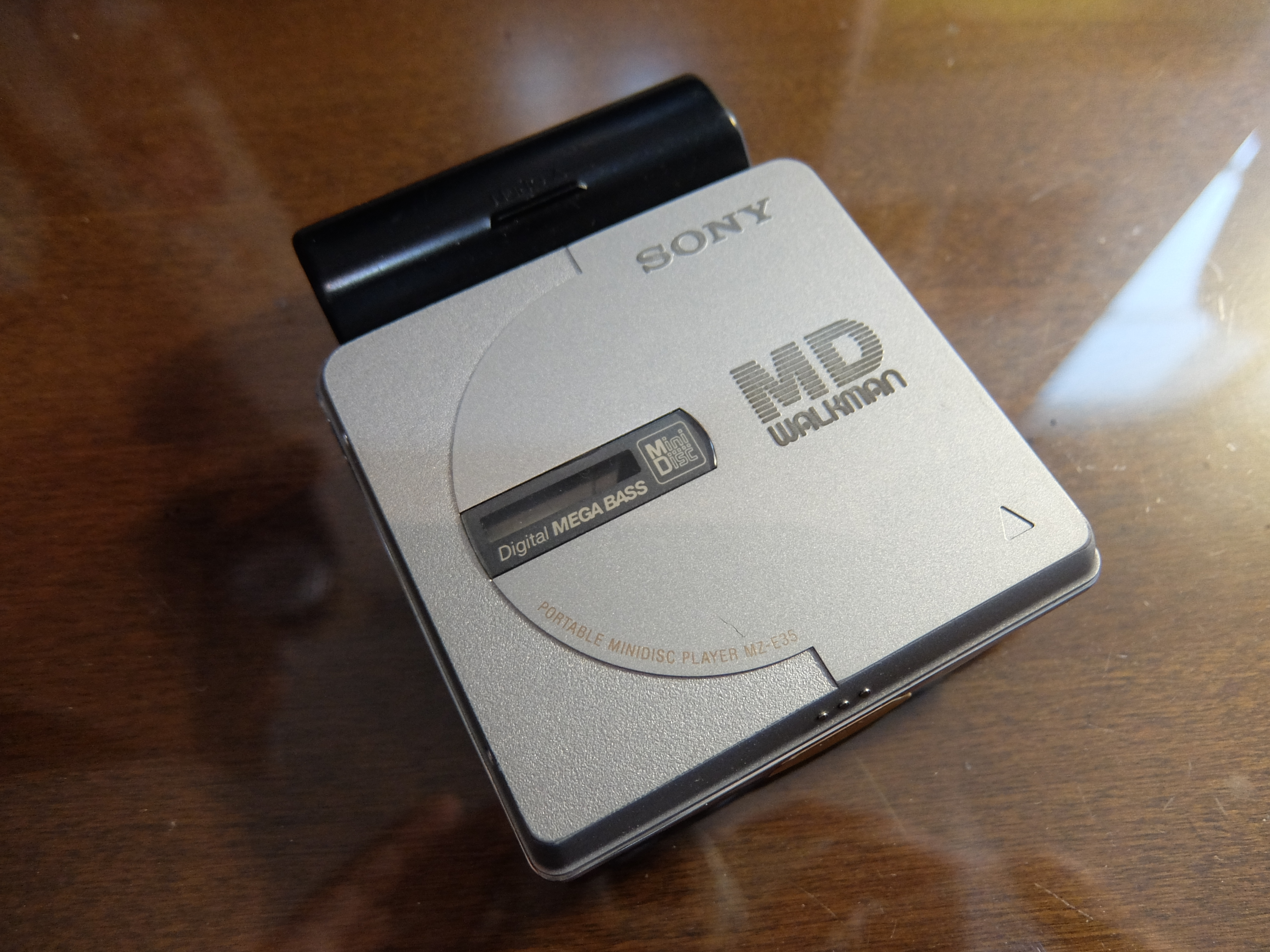 SONY Walkman MZ-E35